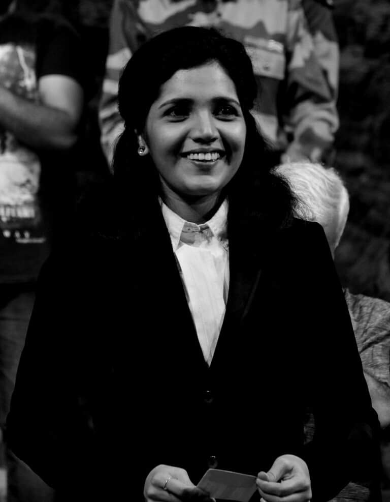 कोडमंत्र नाटकात वकिलाच्या भूमिकेत मुक्ता